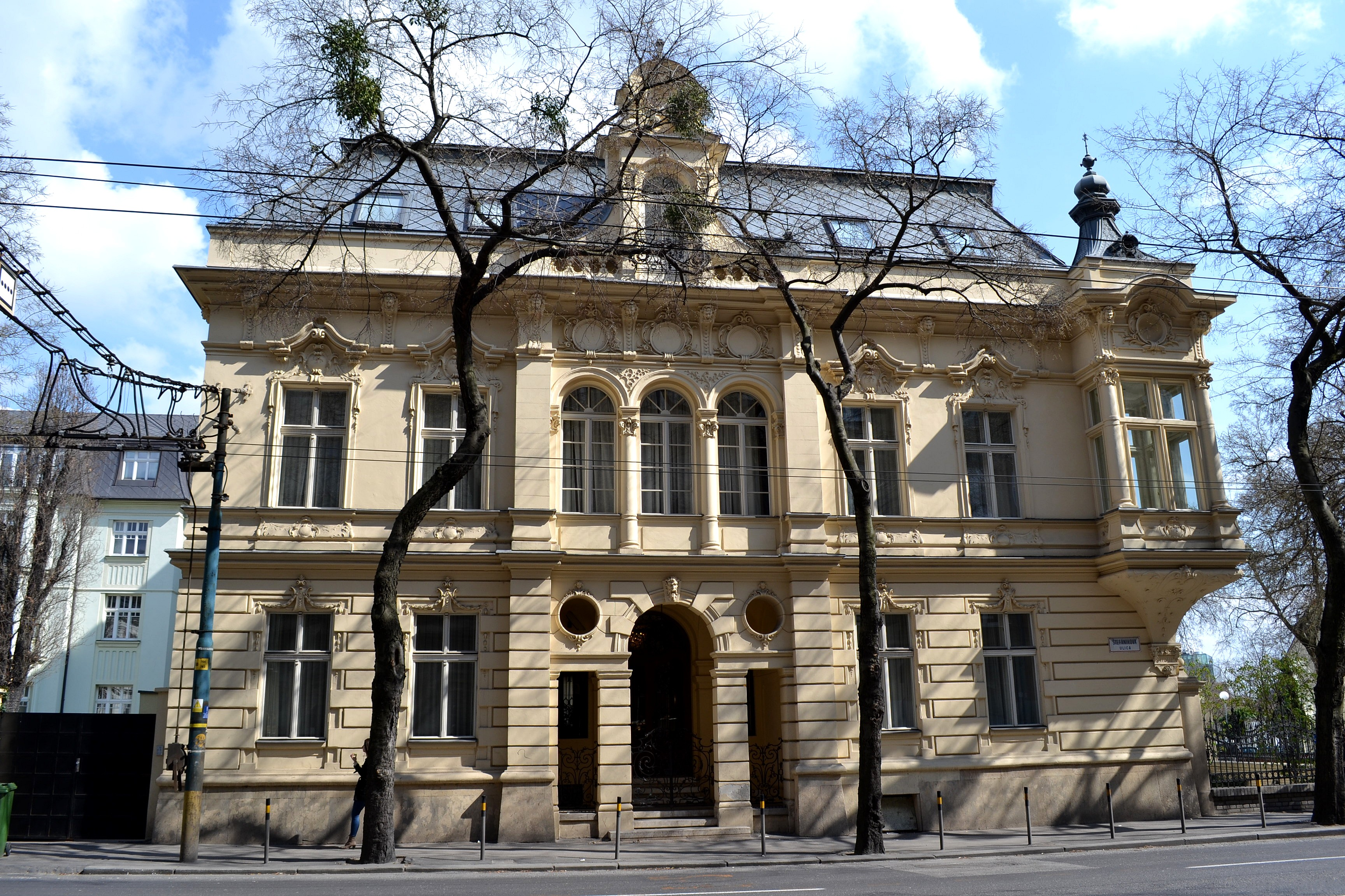 Vila dr. Tauschera. Neobarokovú vilu na rohu Štefánikovej ul. (č. 4) a Spojnej ul. si u firmy Kittler a Gratzl dal v roku 1891 postaviť hlavný mestský lekár Vojtech Tauscher. Pred rokom 1989 v nej sídlil zväz žien